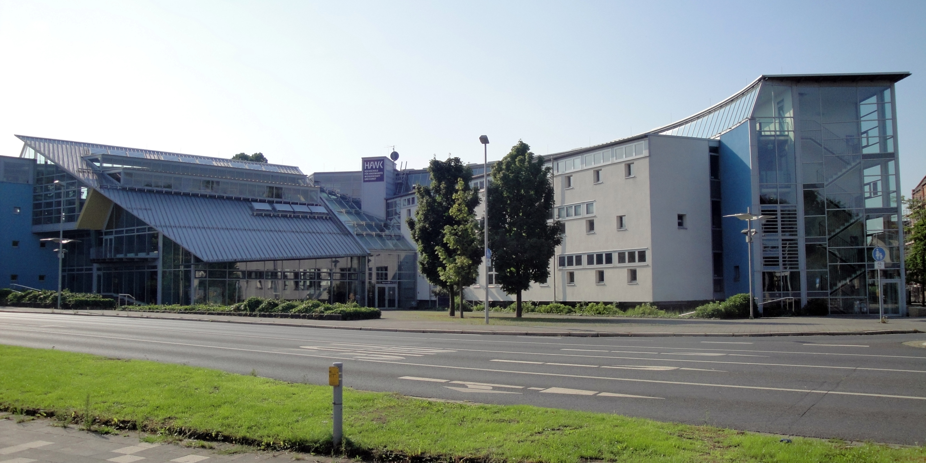 Hochschule für angewandte Wissenschaft und Kunst (HAWK) Hildesheim